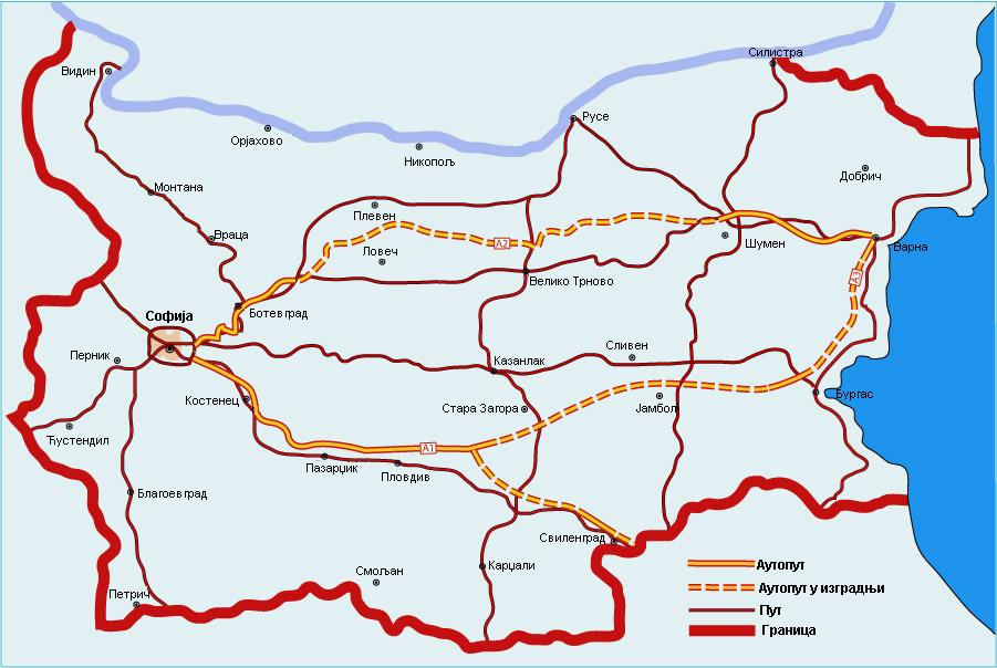 Мрежа путева у Бугарској